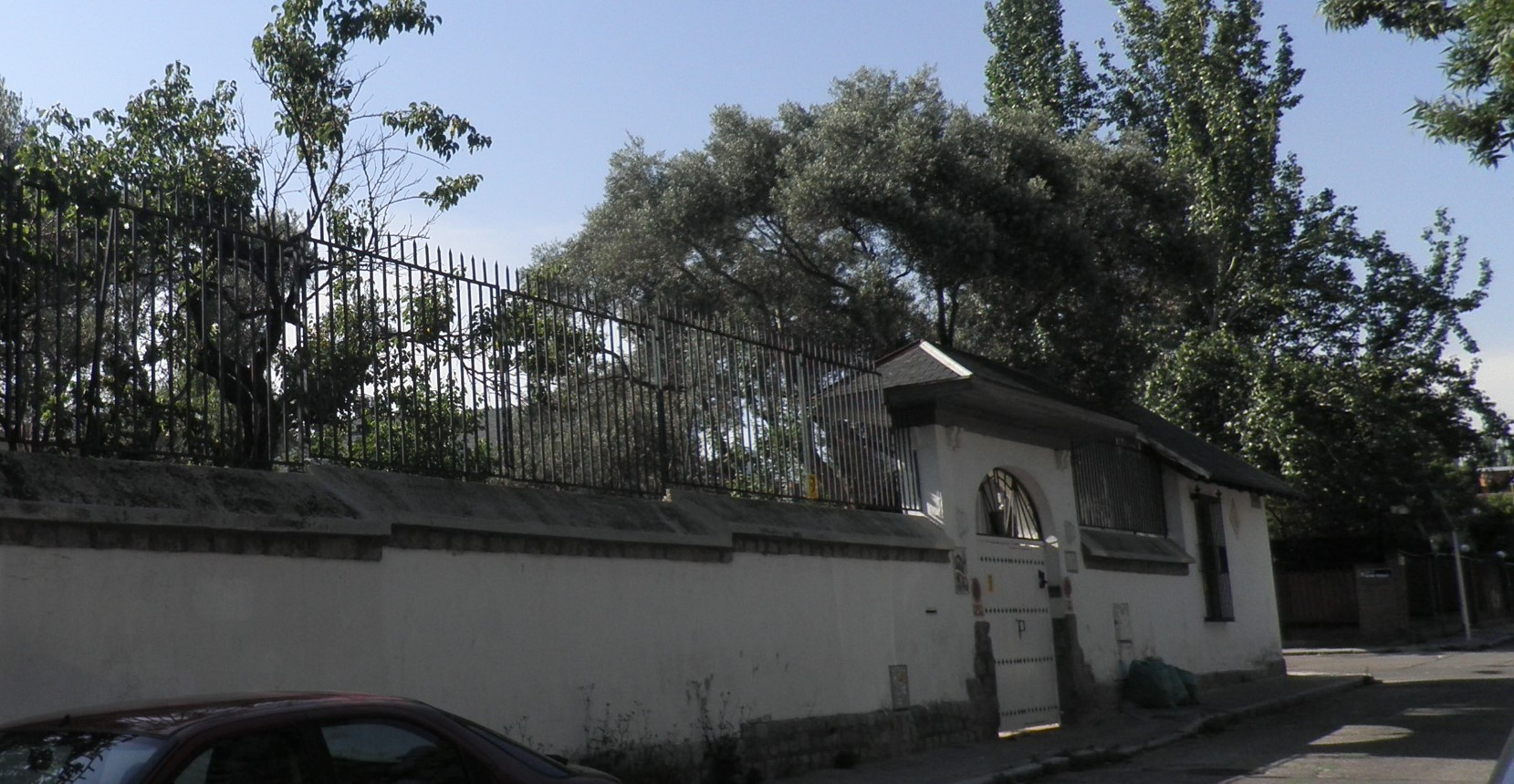 Casa y olivar del sabio Menéndez Pidal